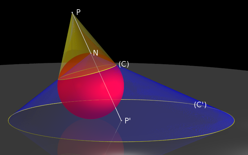 Tout cercle de la sphère unité est transformé par la projection stéréographique en un cercle du plan de projection (ou une droite de ce plan si le cercle passe par le pôle N de la projection). Considérons le cône tangent à la sphère le long du cercle (C) à projeter. Soit P son sommet et P' son image par la projection stéréographique. Alors (C) se projettera en un cercle (C') de centre P'. En effet, l'image d'une génératrice quelconque du cône est l'intersection du plan qui la contient et qui passe par N, avec le plan de projection. Il s'agit donc d'une droite passant par P'. Par ailleurs, la génératrice coupe (C) à angle droit et, la projection stéréographique étant conforme, son image coupe (C') également à angle droit. (C') est donc une courbe coupant toute droite issue de P' à angle droit. Il s'agit d'un cercle de centre P'.